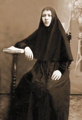 Прмц. Екатерина (Константинова). Фотография. Нач. XX в.